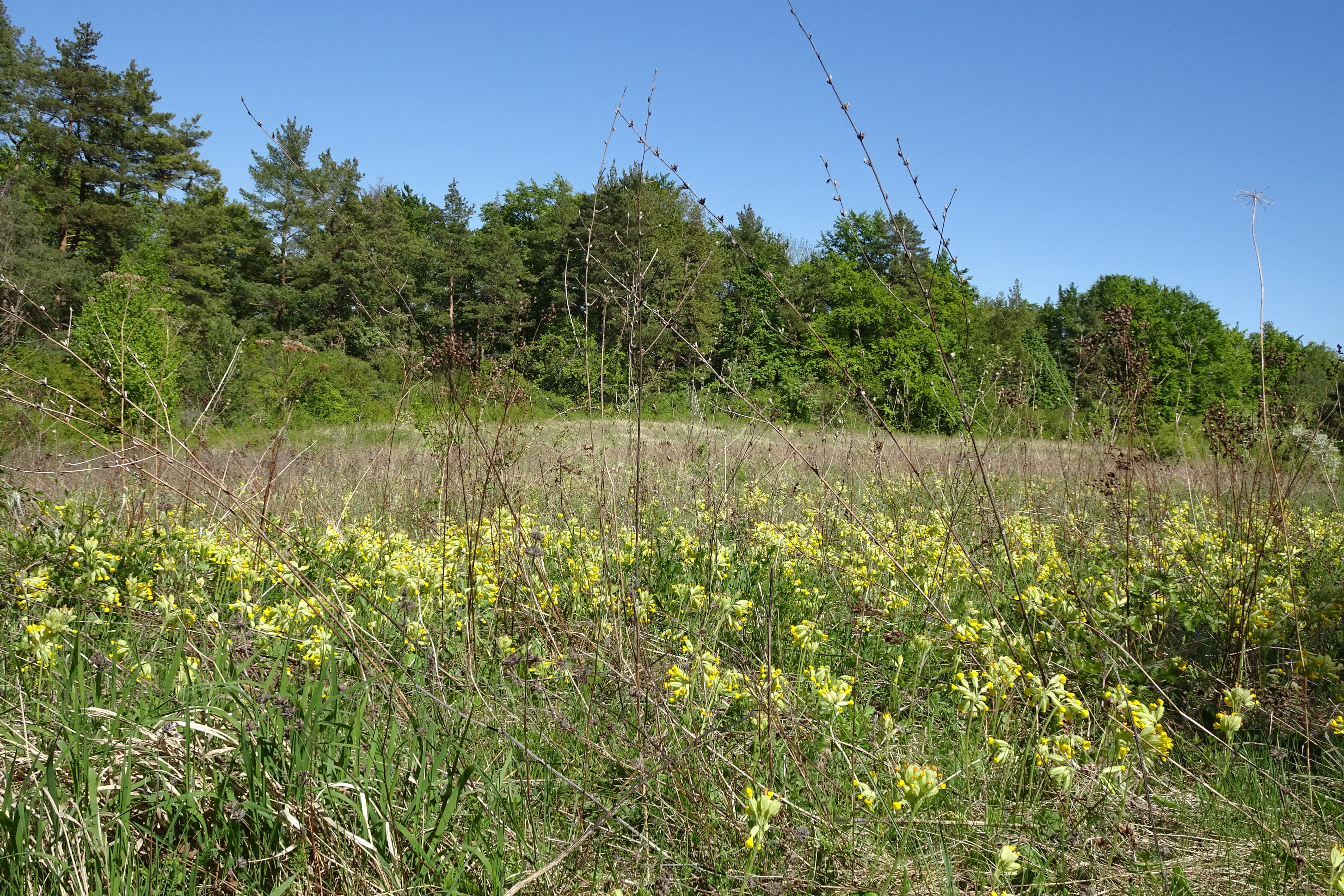 Die Ebenauer Köpfe gehören zum Naturschutzgebiet „Ebenauer Köpfe und Wisch“ und zum Flora-Fauna-Habitat-Gebiet „Creuzburger Werratal-Hänge“ im westthüringischen Wartburgkreis. Das Naturschutzgebiet hat die thüringeninterne Kennung 64 und den WDPA-Code 162830. Das FFH-Gebiet hat in Thüringen die Nummer 35, die europäische Gebietsnummer 4927-303 und den WDPA-Code 555520295.